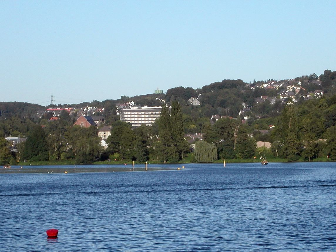 Essen Kupferdreh vom Baldeneysee aus gesehen